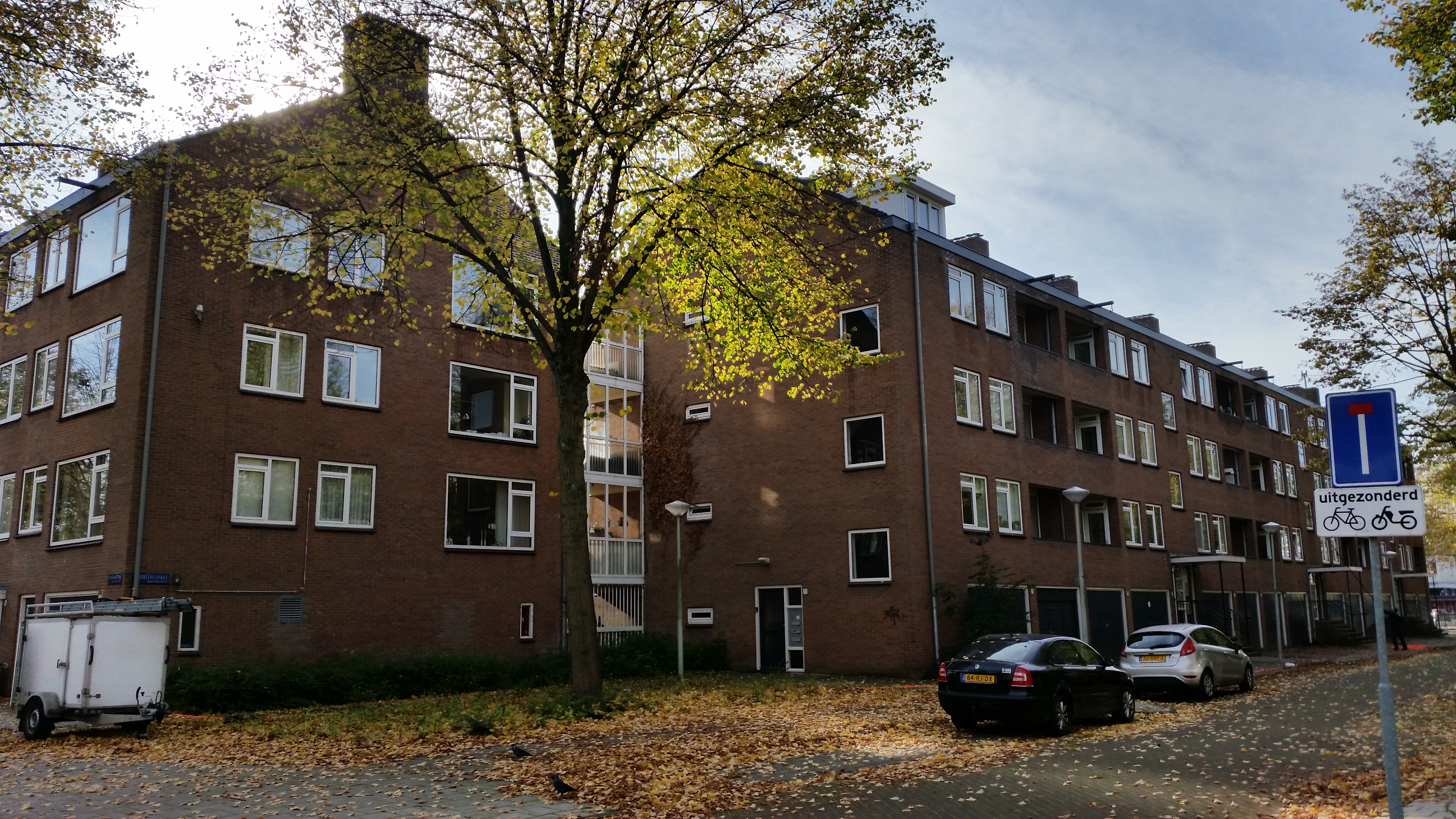 Kastelenstraat 273-313, Amsterdam, ontwerp Zanstra, Göbel en den Hertog